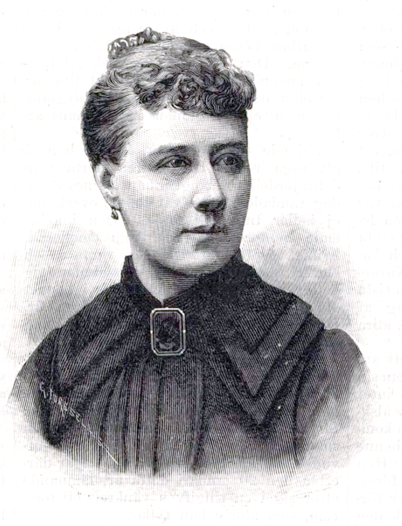 Virginia Larsson (1844-1893)